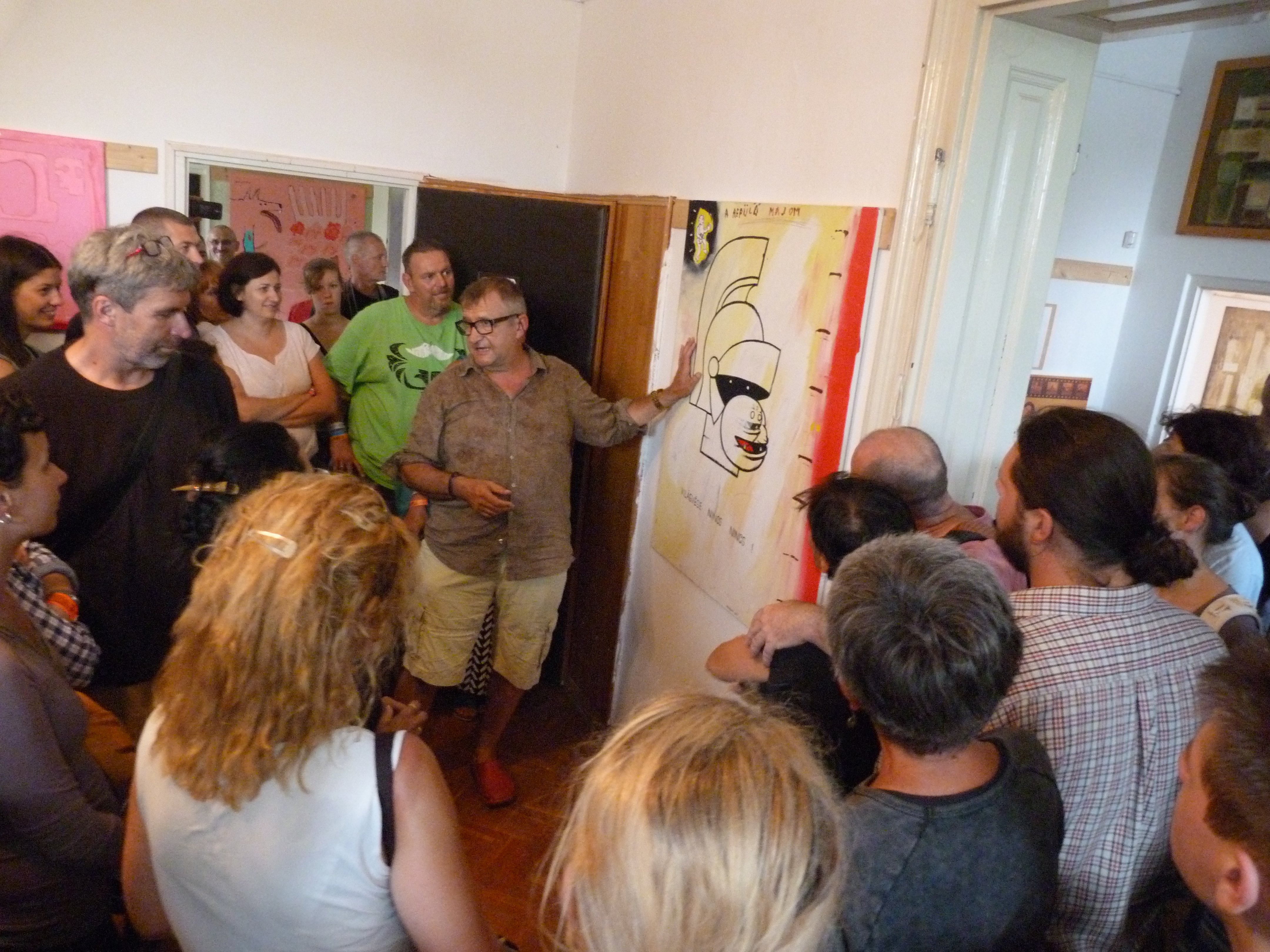 A felvétel 2014. augusztus 6-án szerdán készült Nagyharsányban. 7. Ördögkatlan Fesztivál. Wahorn András kiállítása. Források: ordogkatlan.hu ©© Derzsi Elekes Andor, Budapest, 2014, You are authorised to use these photos and vids under Creative Commons – even for commercial, for profit purposes. Photos must be attributed to Derzsi Elekes Andor. All of the photos and vids in the Metapolisz DVD line are under Creative Commons and can be used even for commercial – for profit – purposes. Recommended Citation Derzsi Elekes Andor: Metapolisz DVD line